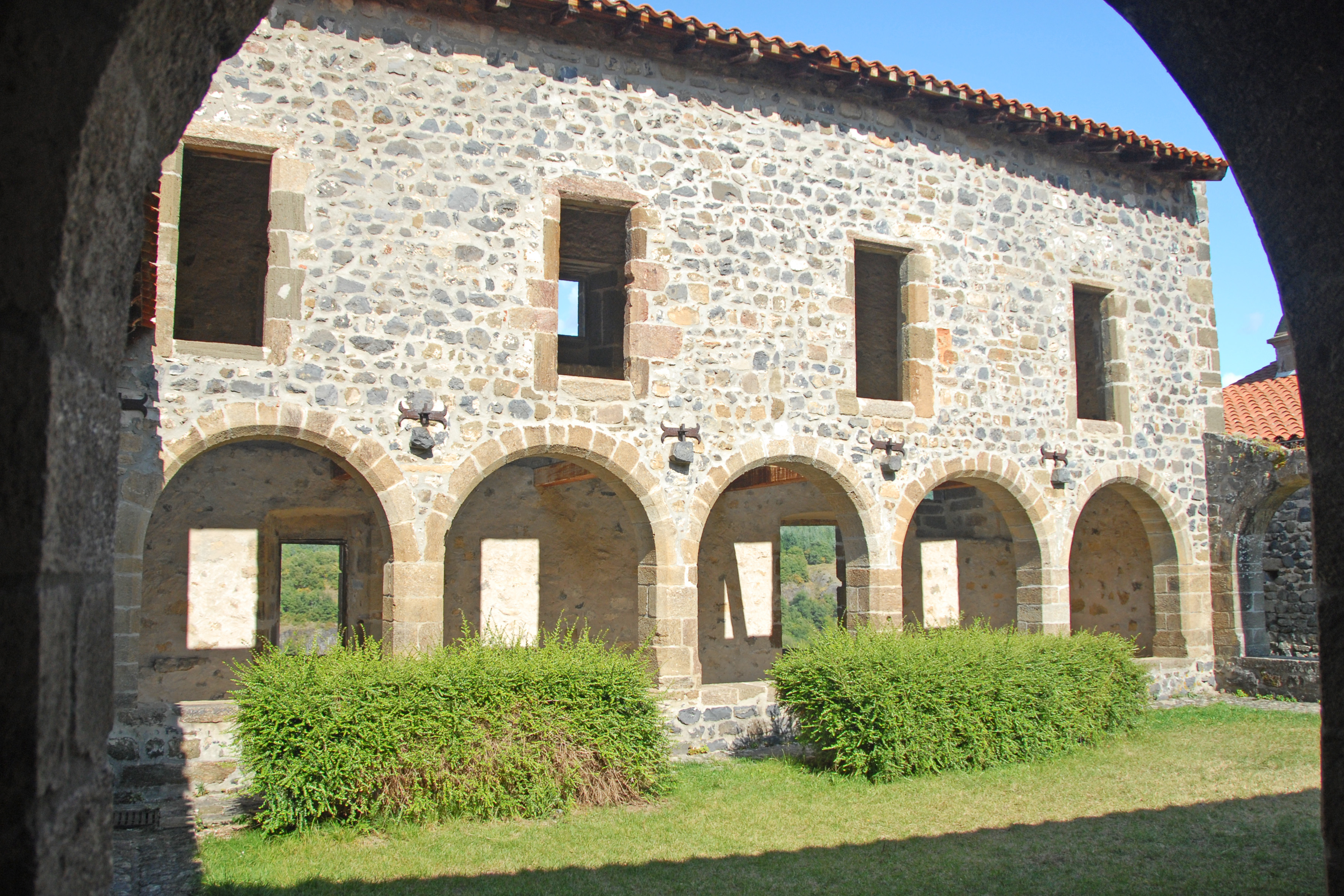 Chanteuges, Kreuzgang, Ostgalerie